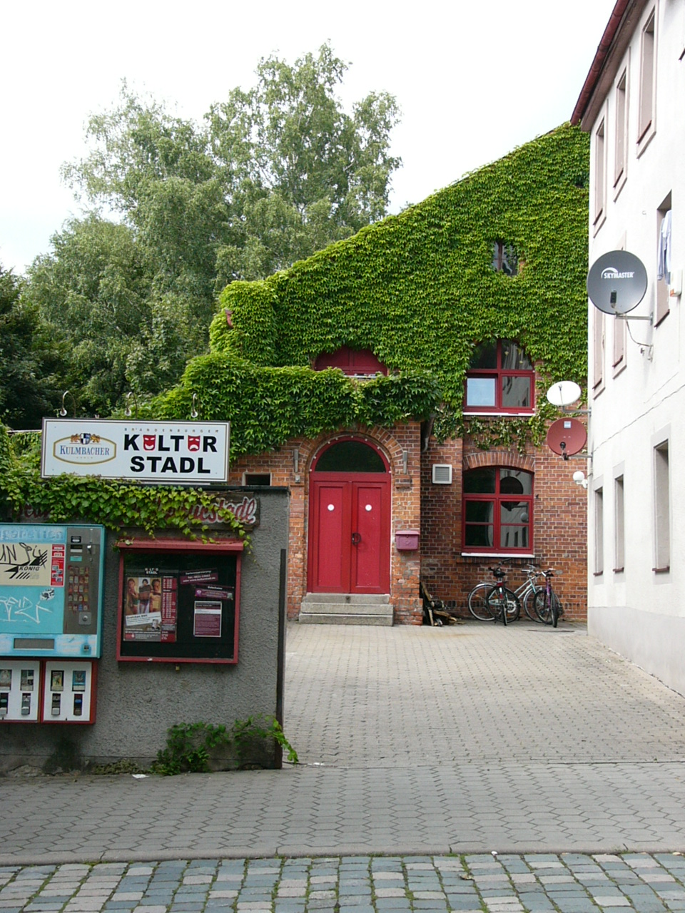 Bayreuth, Brandenburger Kulturstadl, Brandenburger Straße 35